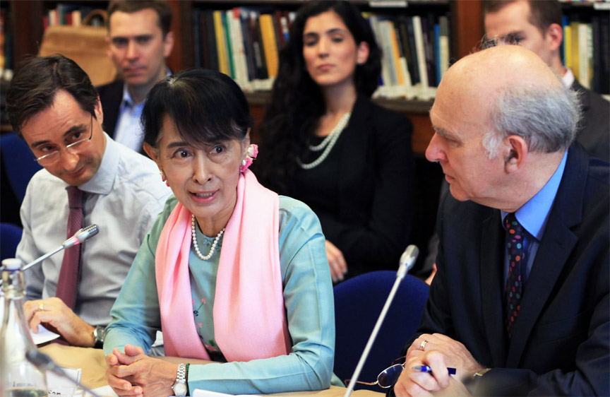 22 June 2012